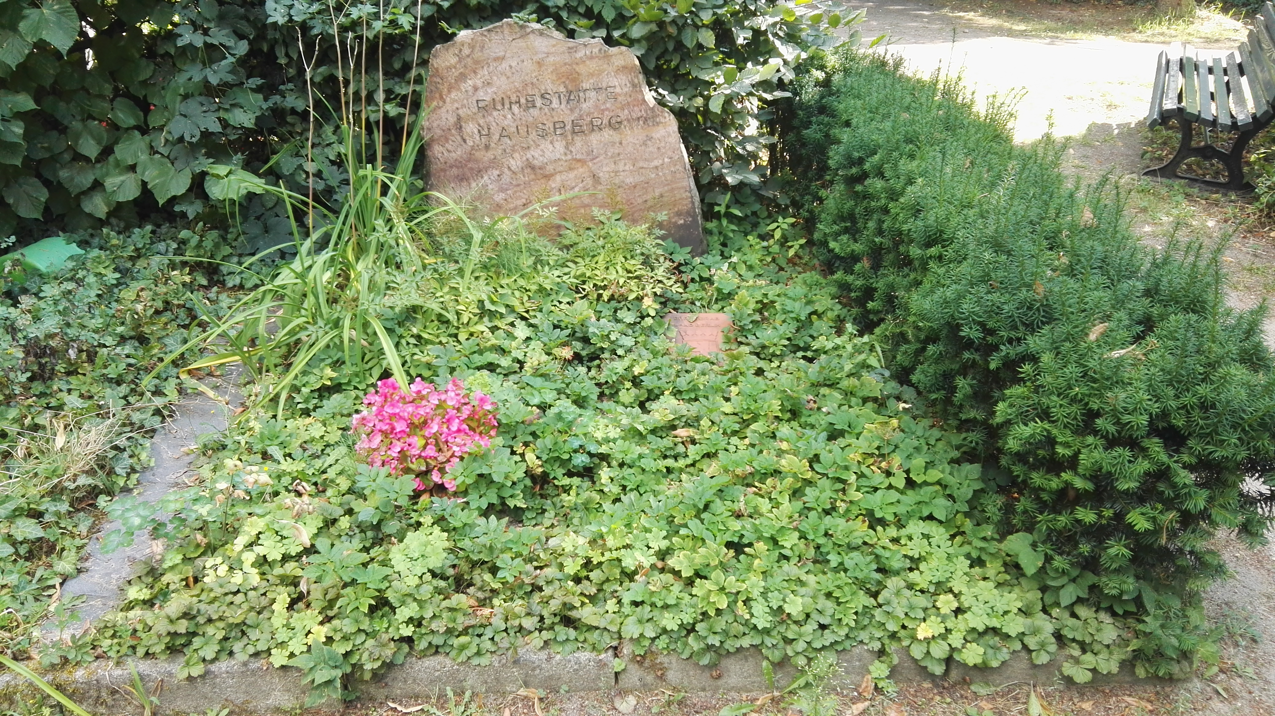 Ehrengrab des Berliner Politiker Fritz Hausberg auf dem Friedhof Reinickendorf II